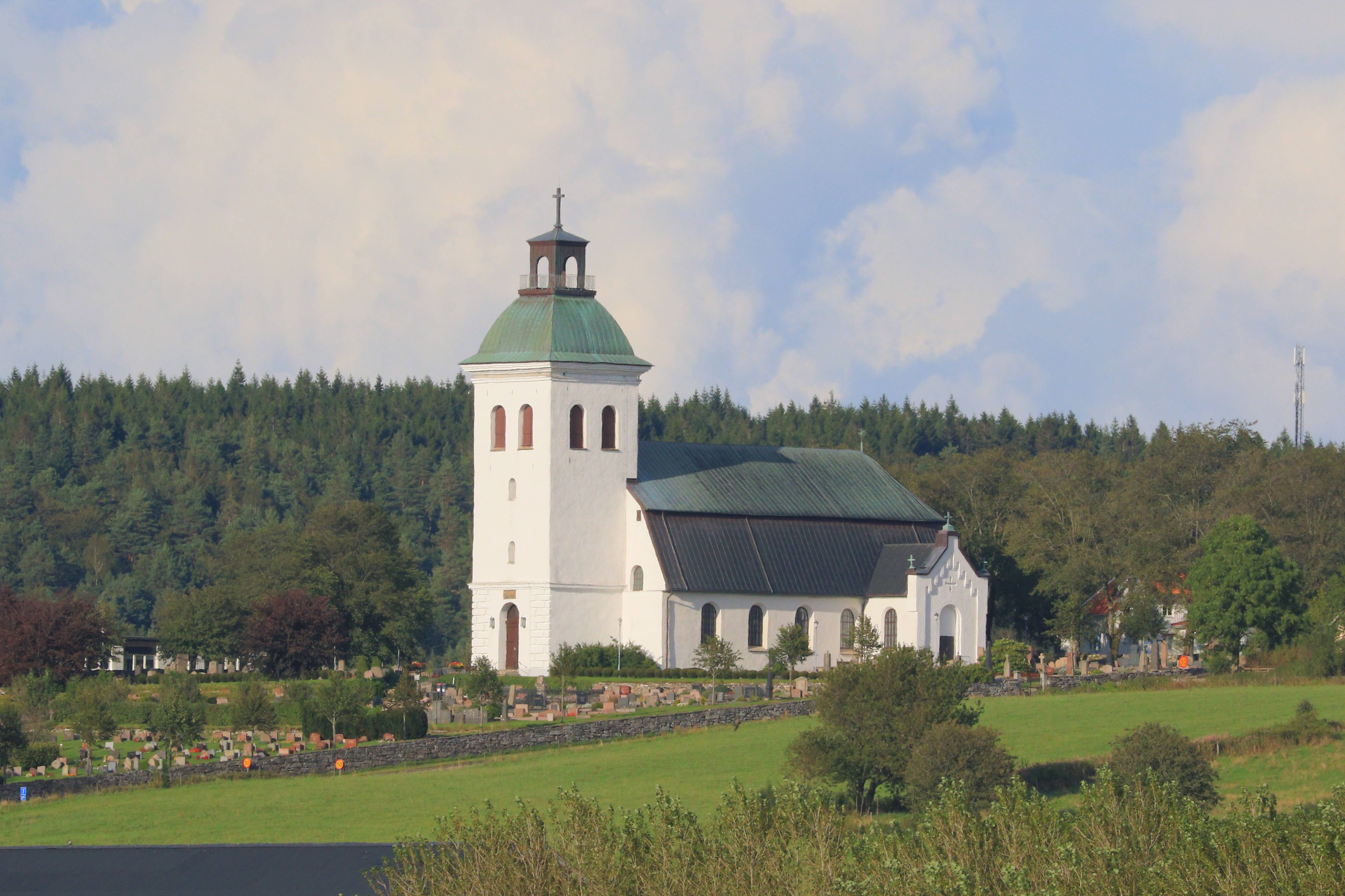 Fjärås Kyrka.